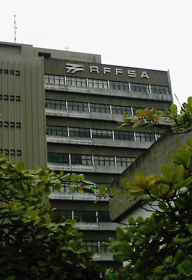 Foto do prédio sede da antiga RFFSA em Juiz de Fora. Hoje, nele está sediada a MRS Logística.